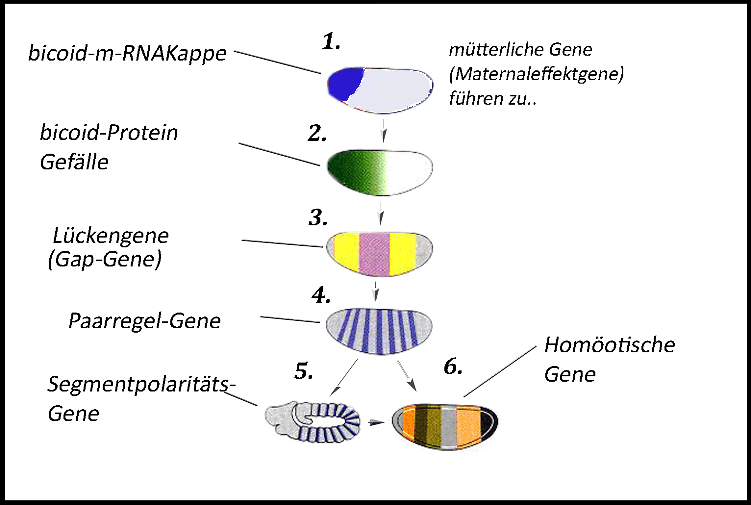 Genkaskade kontrolliert die Musterbildung beim Drosophila-Embryo